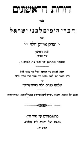 שער הספר דורות הראשונים